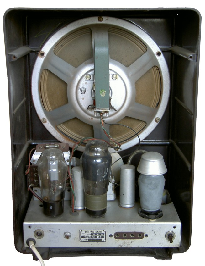 Volksempfänger von innen selbst fotografiert am 21.11.2005